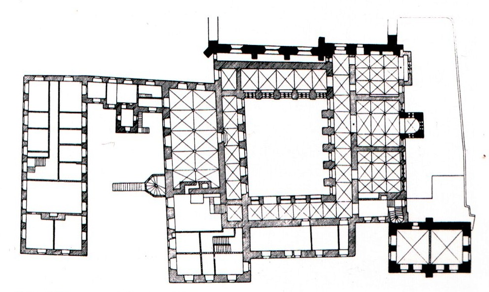 Grundriß des Klosters Wedinghausen in Arnsberg